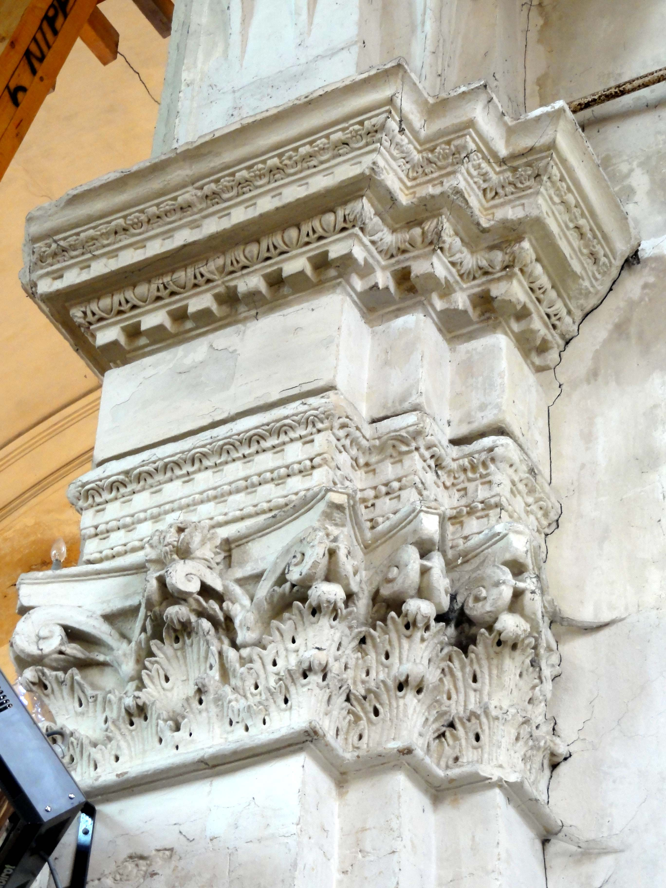 Chapelle nord, chapiteau côté ouest.